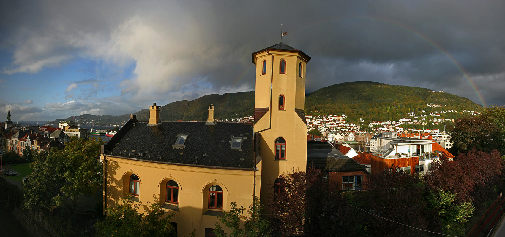 Kortegården er det gule huset som ligger i Klostergaten 1, på det høyeste punktet på Nordneshalvøyen i Bergen. I bakgrunnen ser man Bergen med en del av Bryggen, Fløien, Sandviken, Sandviksfjellet og en regnbue.